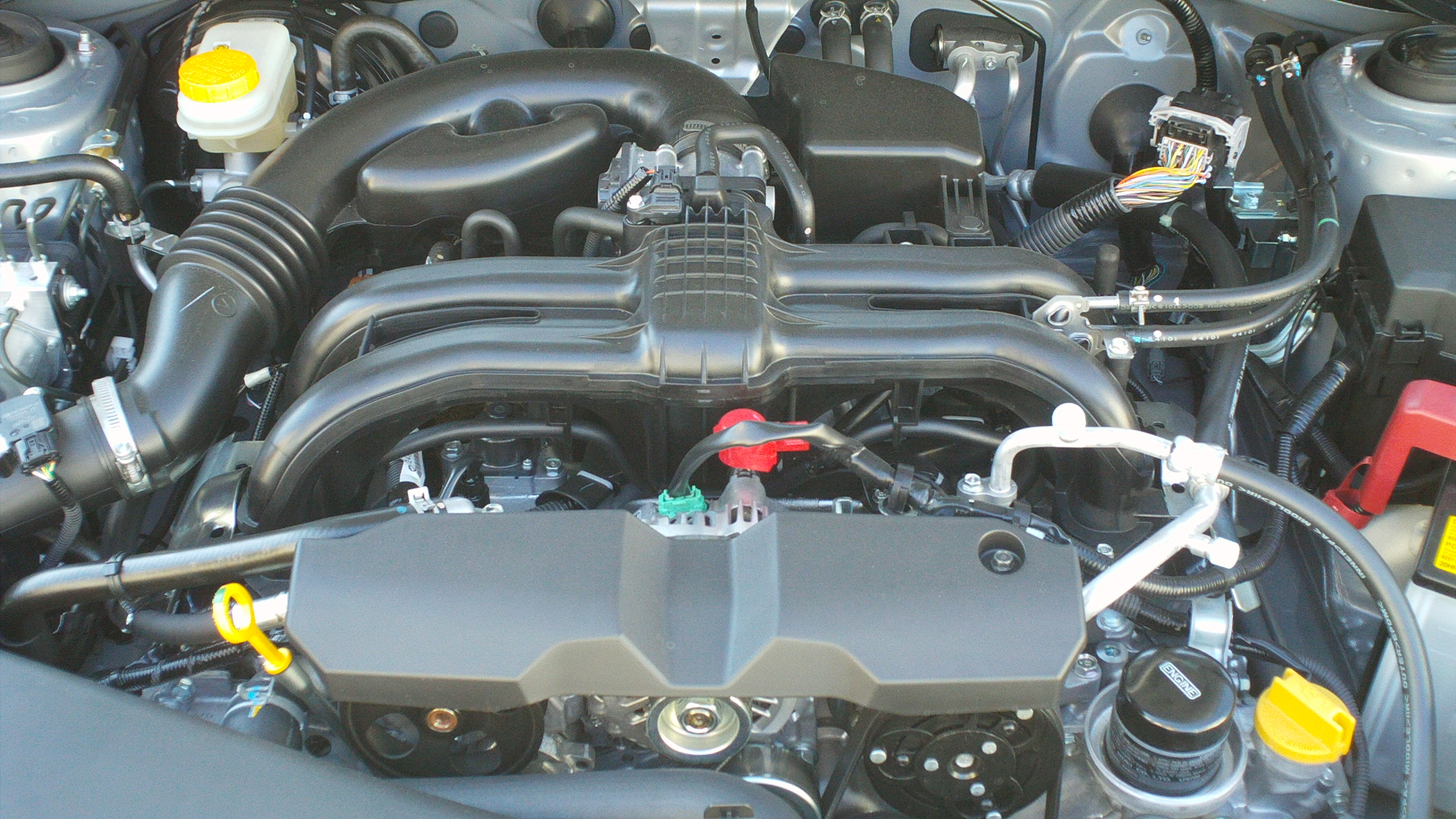 スバル・FB16型エンジン(MY14インプレッサG4)